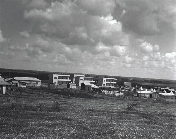 כפר אברהם - מראה נוף